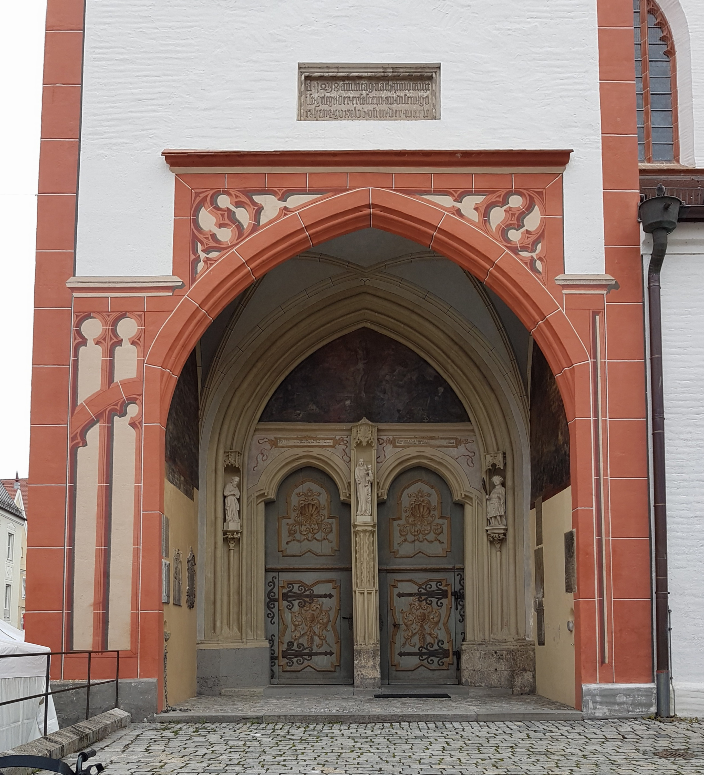 Mariä Himmelfahrt (Landsberg am Lech), das südwestliche Hauptportal.